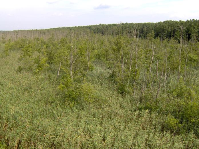 Świdwie (jezioro) - rezerwat